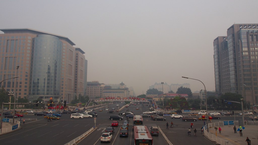 Beijing